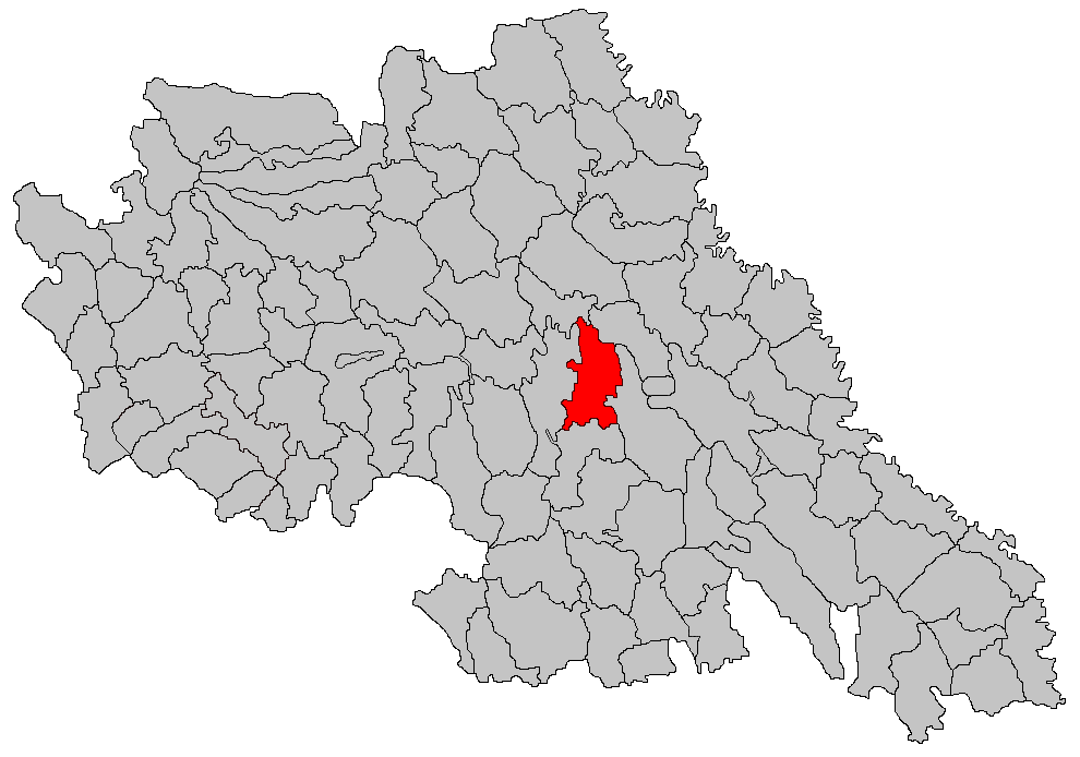 Categorie:Hărţi ale judeţului Iaşi